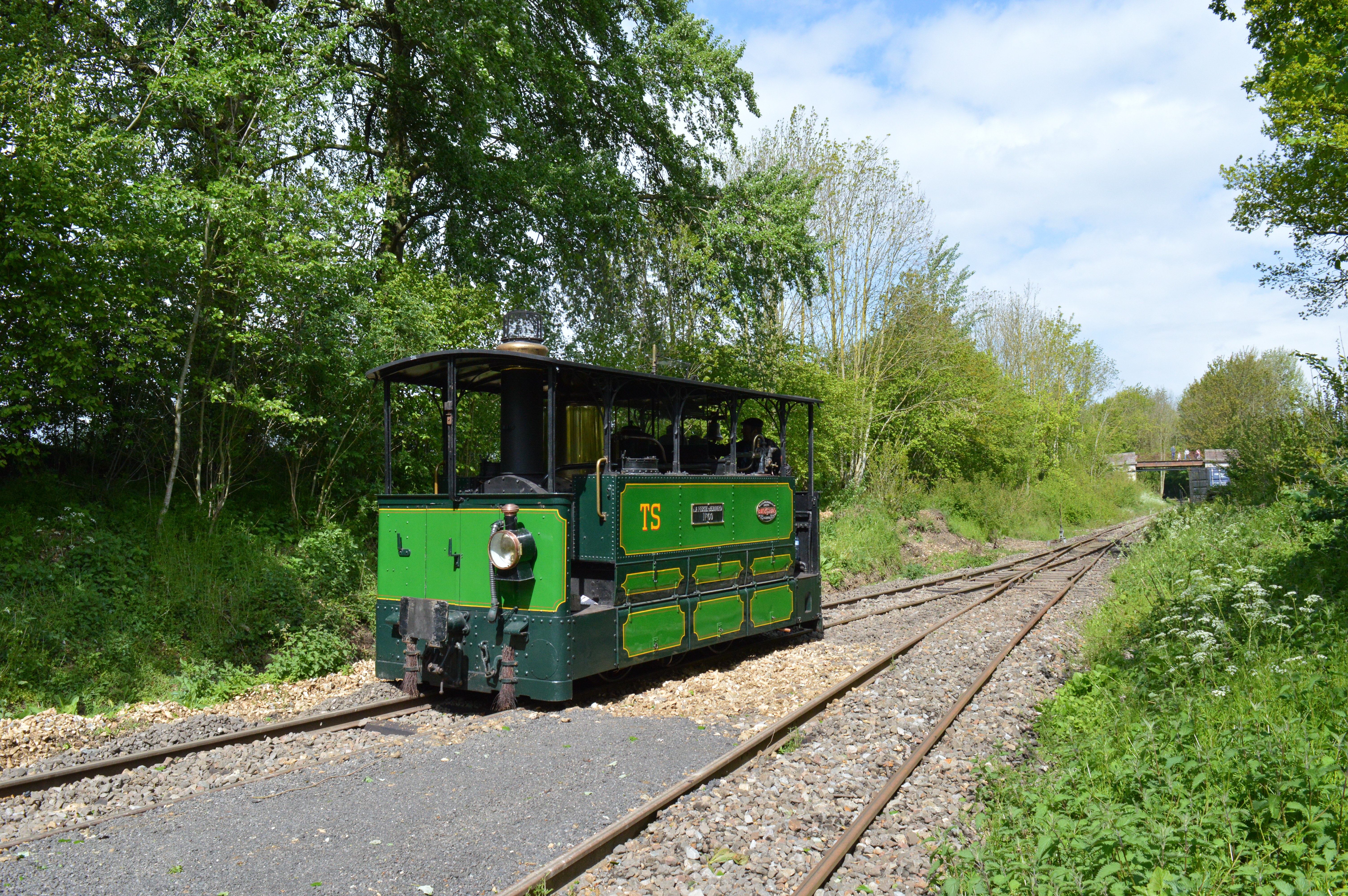 Locomotive 030T n°60 des TS entrant en gare de Rotangy